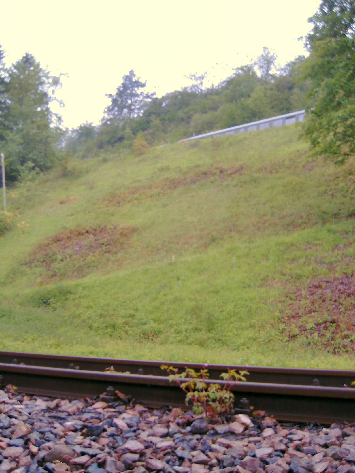 Stockhaldetunnel der Wutachtalbahn: Zug auf Talfahrt vor der oberen Einfahrt (oben). Unten der weitere Verlauf des Gleises nach der unteren Ausfahrt.